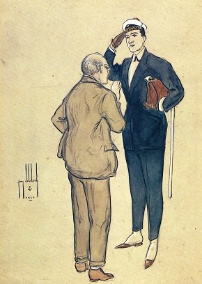 Élève préparant le cma dans les années 1920.